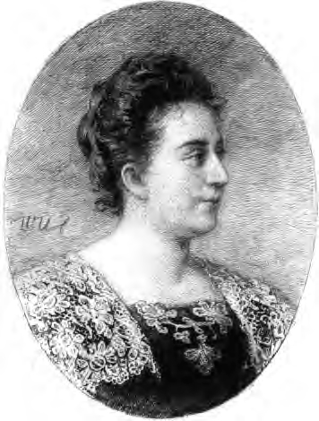 Marie Eugenie Delle Grazie